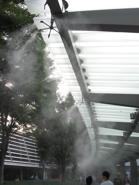 デッキの屋根に設置されたドライミスト装置（六本木ヒルズ、2011年8月撮影）。